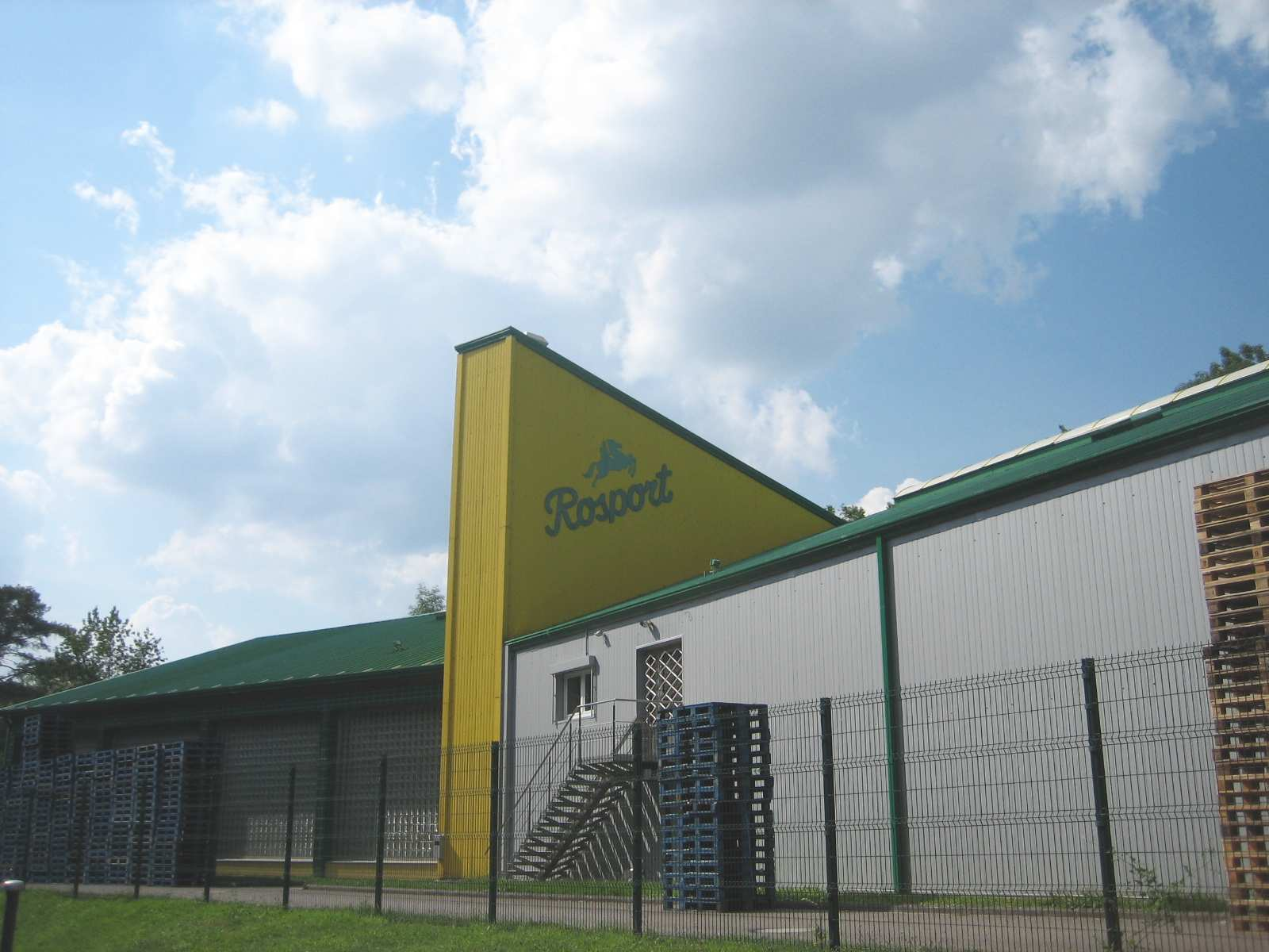 Sujet: D'Offëllanlag vu Sources Rosport SA zu Rouspert, am August 2008. Kategorie:Gemeng Rouspert